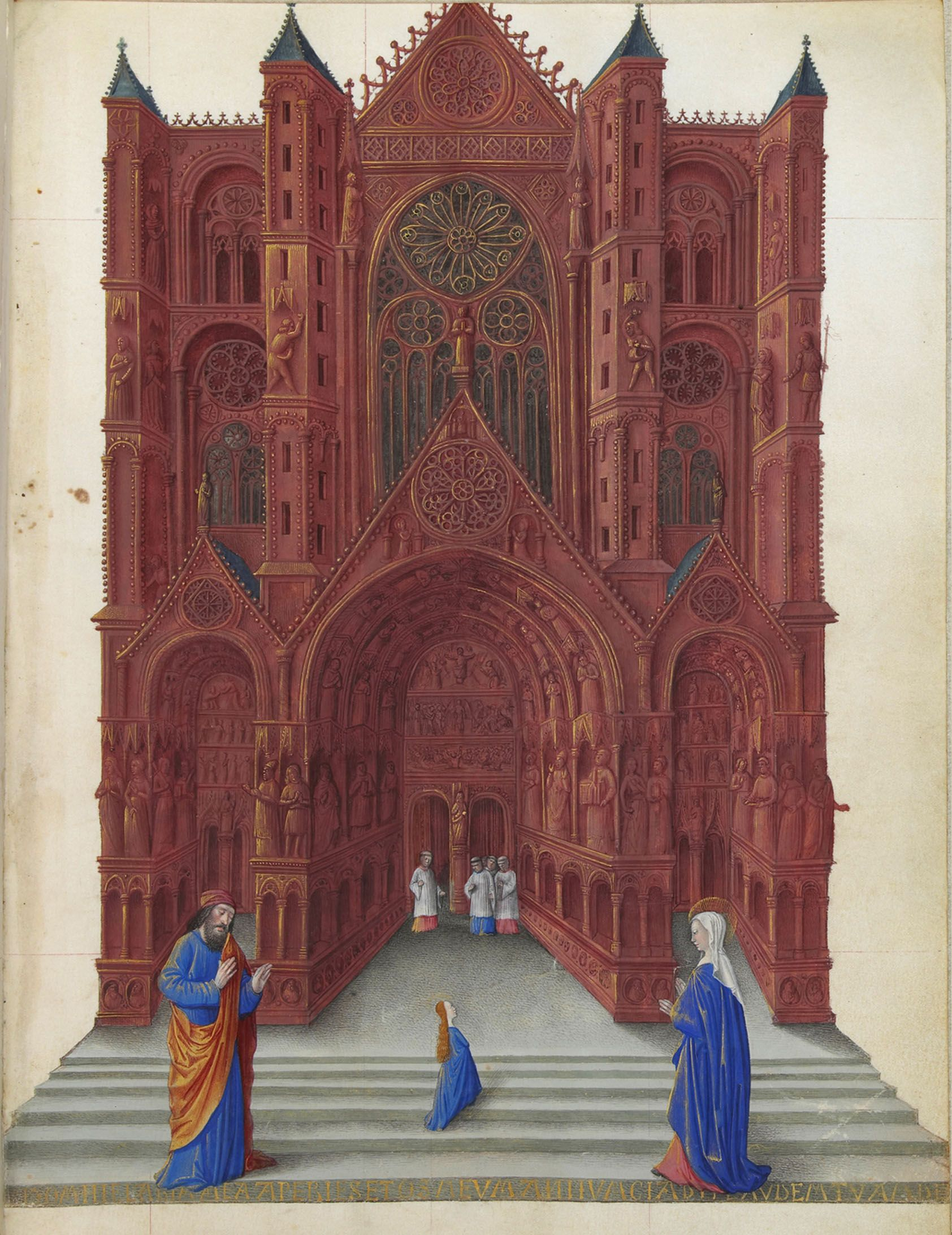 La Vierge au centre monte les marches du temple entourée à gauche de saint Joachim et à droite de sainte Anne. Le temple prend la forme de la façade centrale de la cathédrale de Bourges